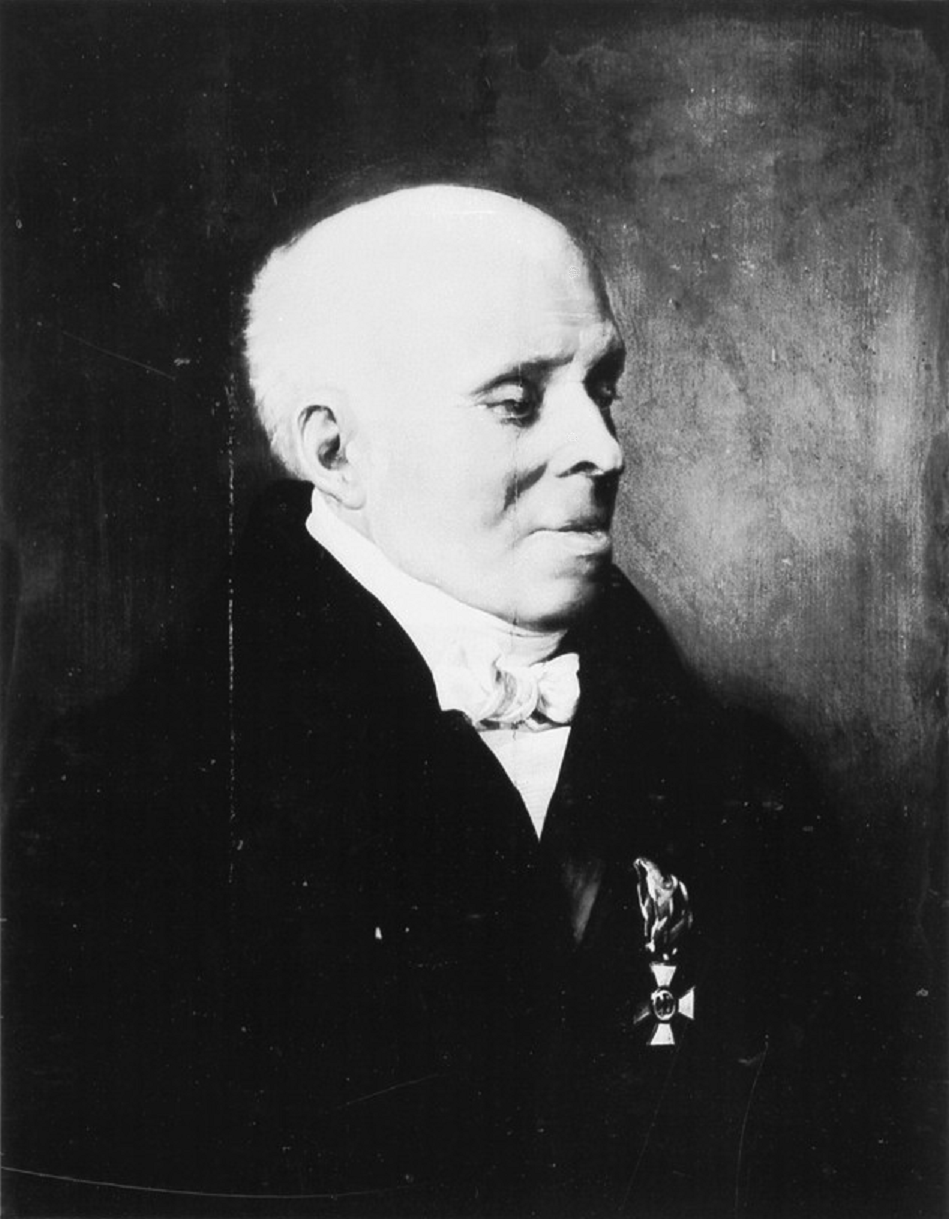 Porträt des Dr. med Franz Olberg (1767-1840), fürstl. anhalt-dessau. Geheimer Medizinalrat und Leibarzt, Ritter des Roten Adler-Ordens